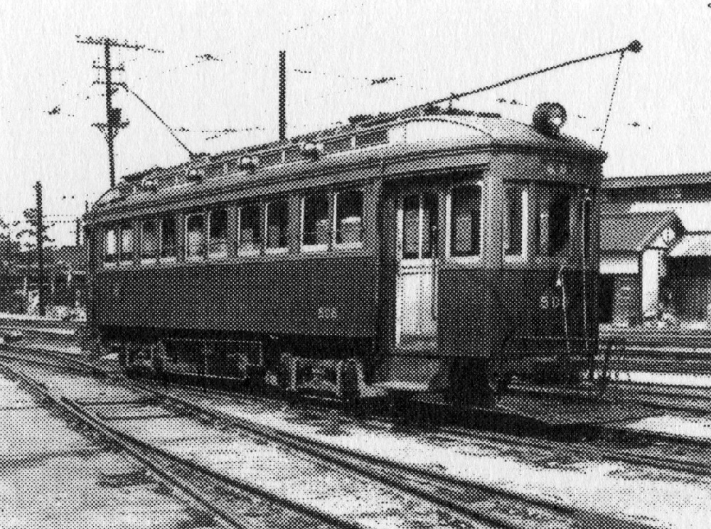 1940年ごろに撮影された広島瓦斯電軌（広島電鉄）の500形電車508号。